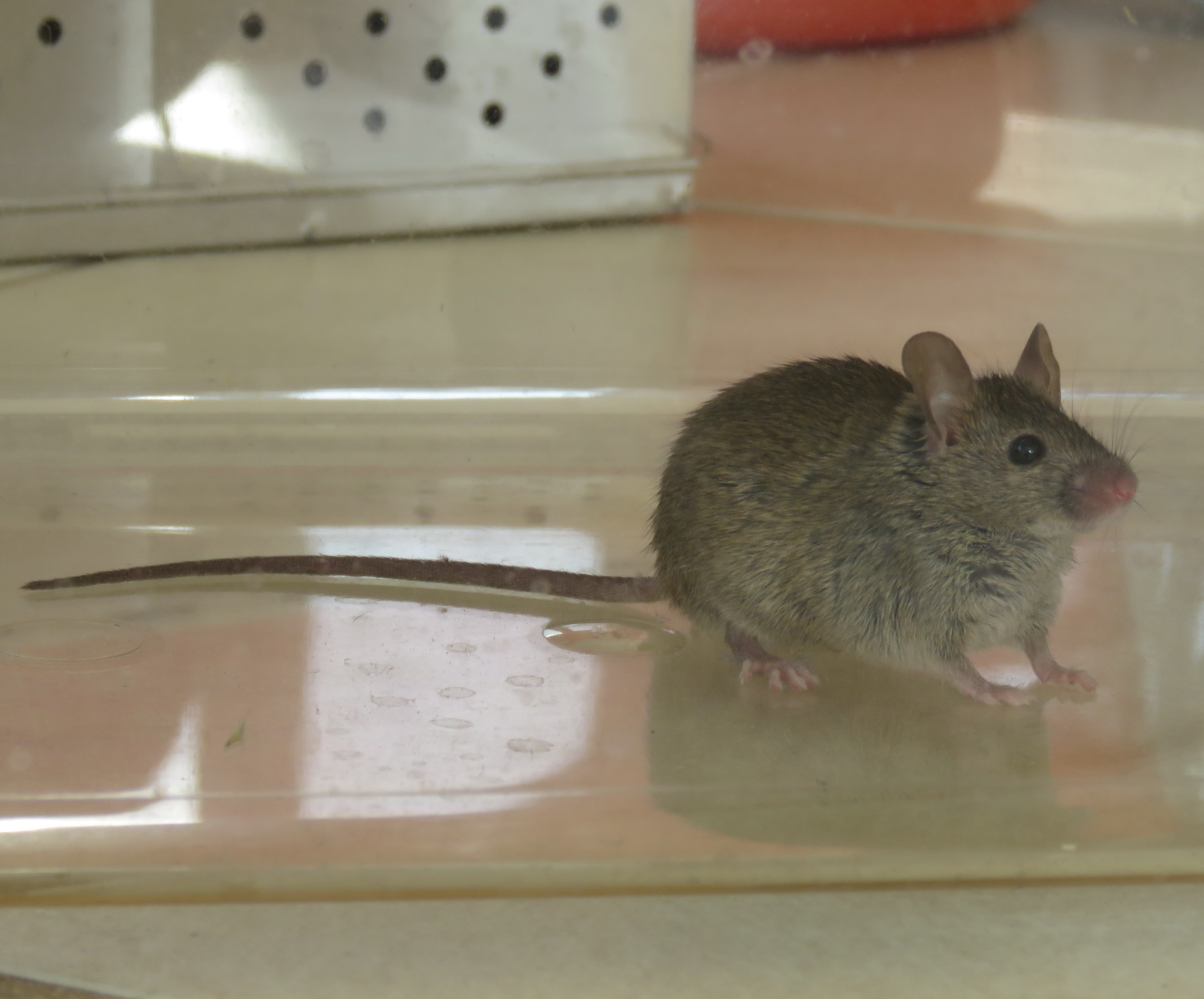 Mus musculus Linnaeus, 1758, House Mouse, Aranda, ACT, Australia, 23 April 2018